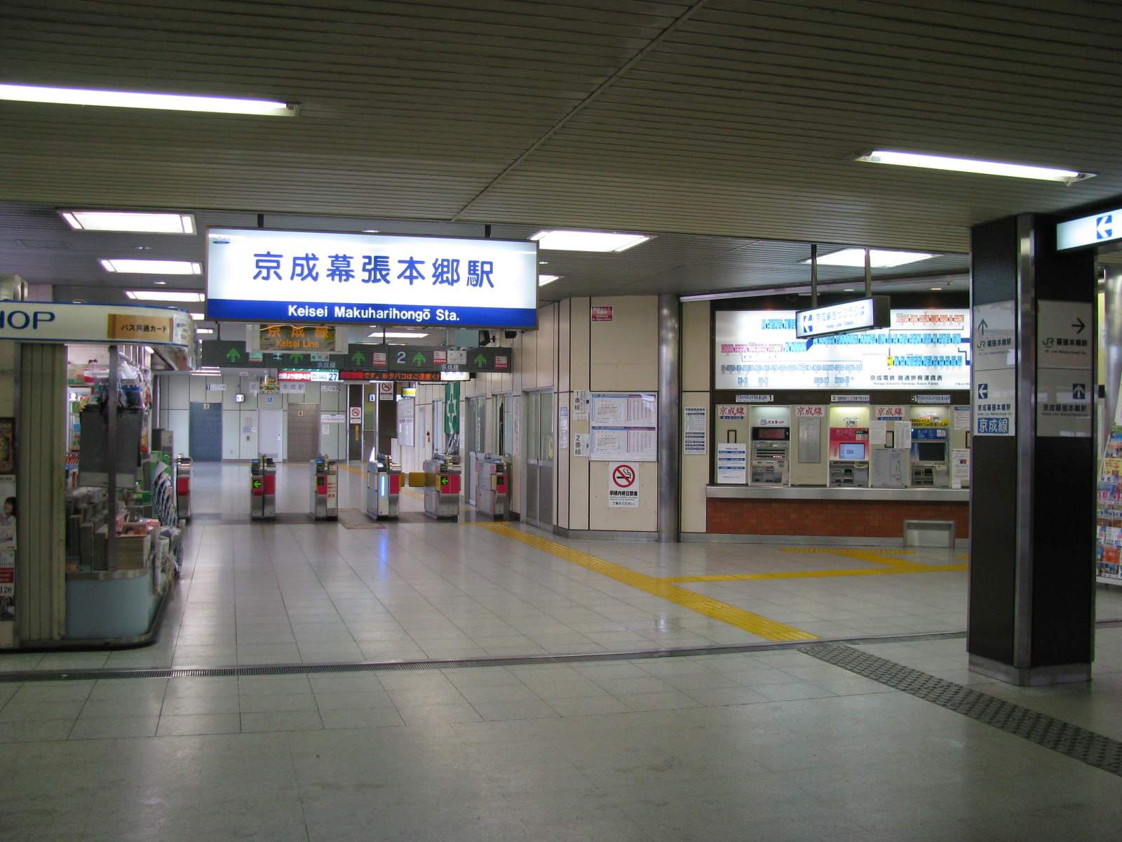 ja：京成幕張本郷駅改札